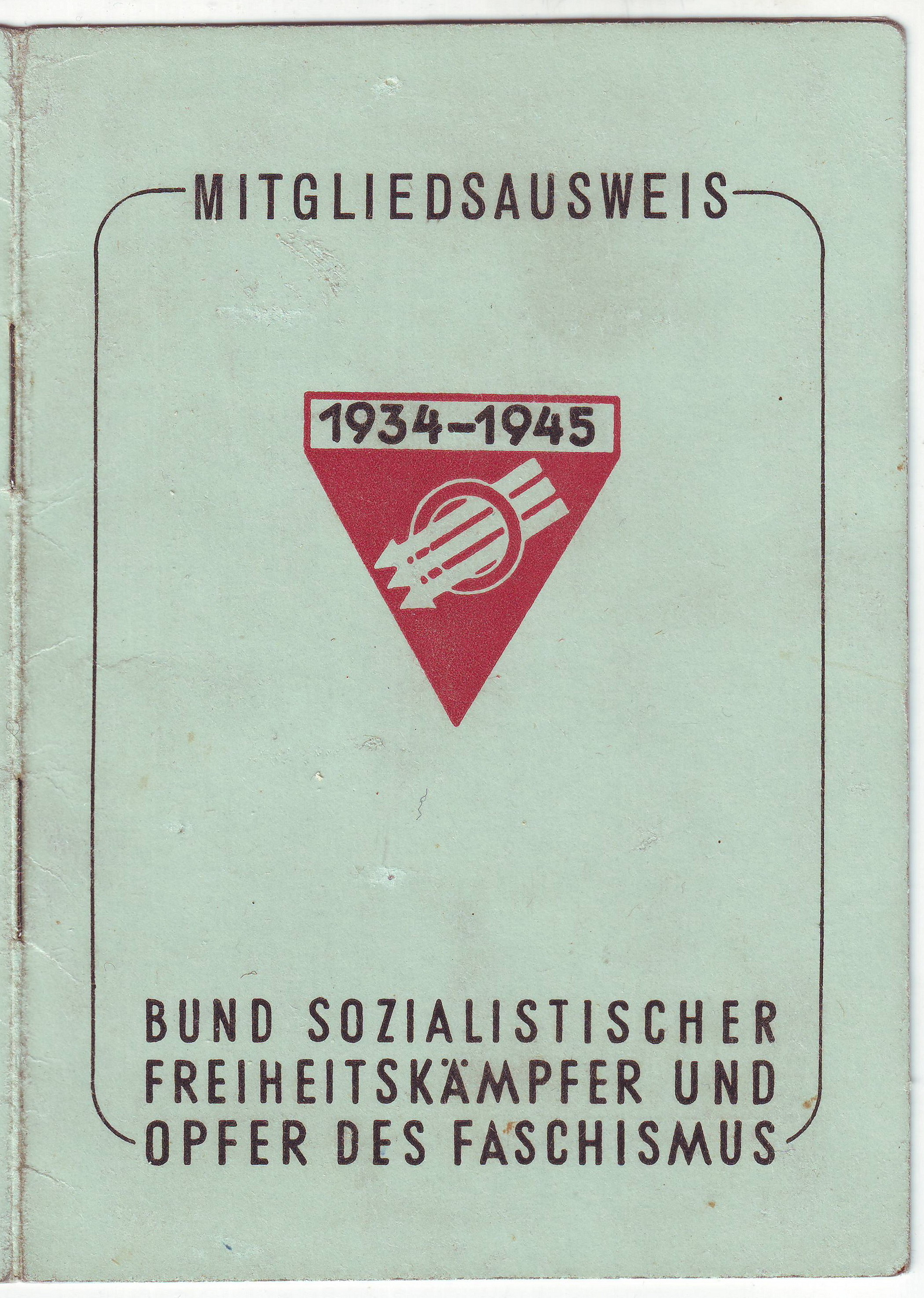 Mitgliedsausweis Bund Sozialistischer Freiheitskämpfer und Opfer des Faschismus - Vorderansicht; ausgestellt 1957